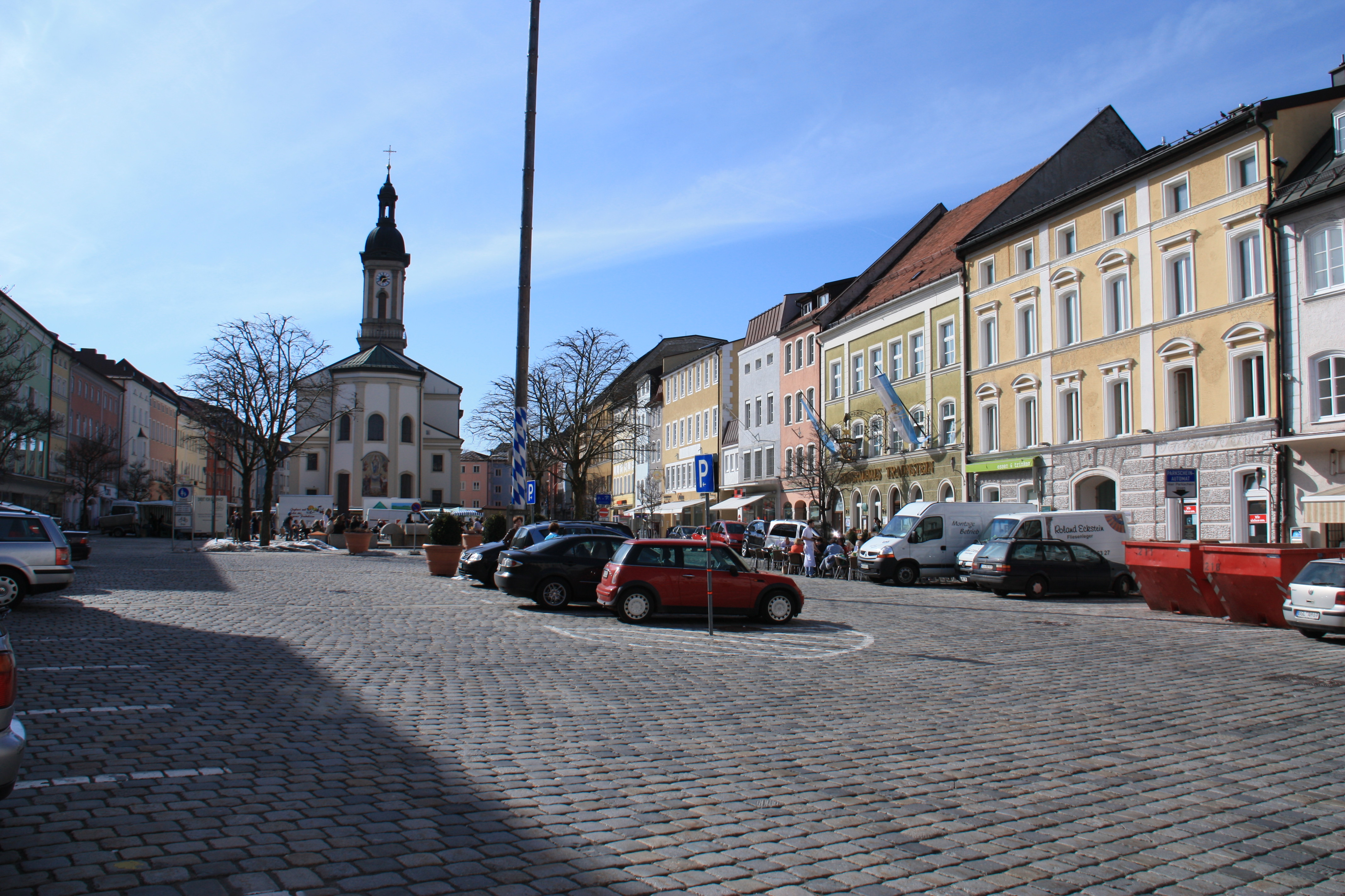 Der Traunsteiner Stadtplatz